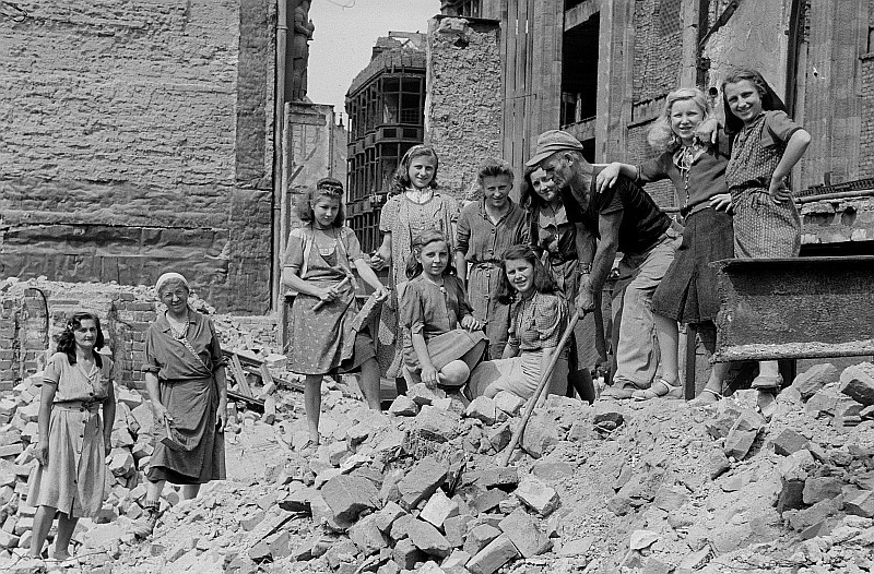 Original image description from the Deutsche FotothekGruppenbild eines Trümmerbeseitigungstrupps